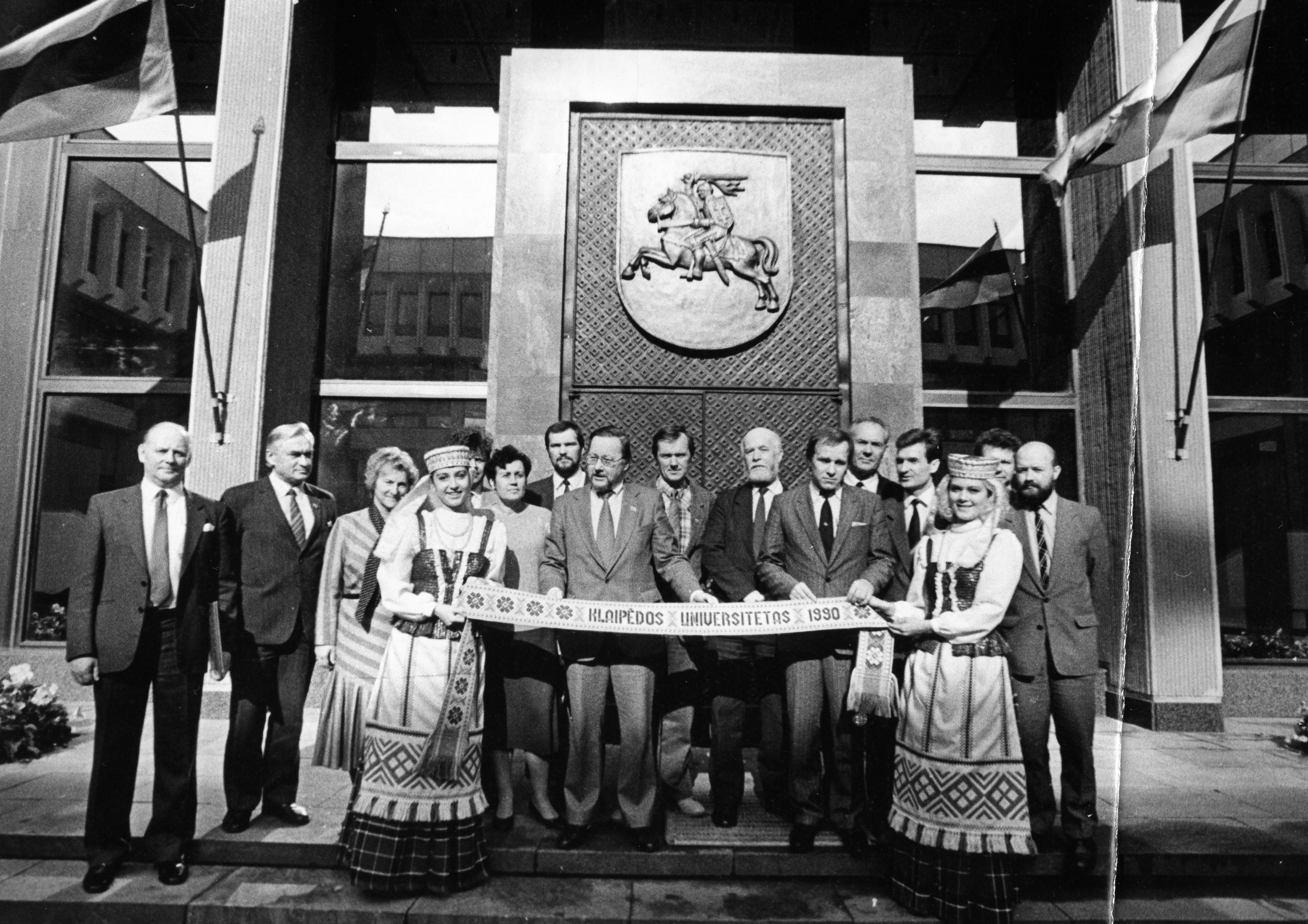 Dne 5. října 1990 ve Vilniusu Obnovující sovět Litevské republiky (nyní Sejmas) přijal dokument o zřízení Klaipėdské university. U té přležitosti slavnostní foto před vchodem. Zleva: Liudvikas Narcizas Rasimavičius, Stasys Malkevičius, Romualda Hofertienė, Zita Šličytė, Vytautas Landsbergis, Vytautas Petras Plečkaitis, Juozas Karvelis, Vytautas Čepas, Alfonsas Žalys, Petras Giniotas, Eugenijus GentvilasLietuvių: 1990-10-05 d. LR AT priimtas dokumentas dėl Klaipėdos universiteto įkūrimo. Iš kairės: Liudvikas Narcizas Rasimavičius, Stasys Malkevičius, Romualda Hofertienė, Zita Šličytė, Vytautas Landsbergis, Vytautas Petras Plečkaitis, Juozas Karvelis, Vytautas Čepas, Alfonsas Žalys, Petras Giniotas, Eugenijus Gentvilas